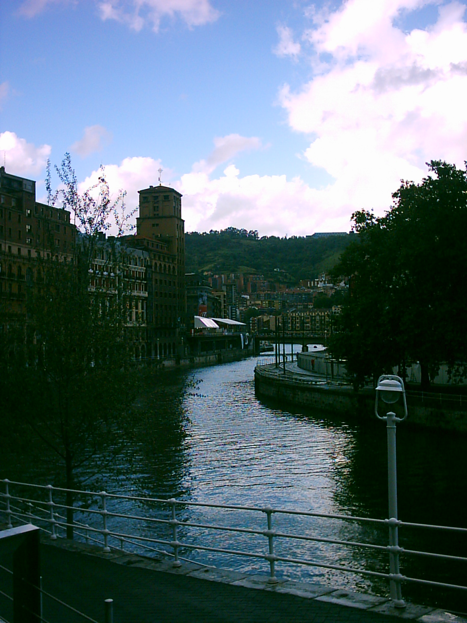 Ría de Bilbao